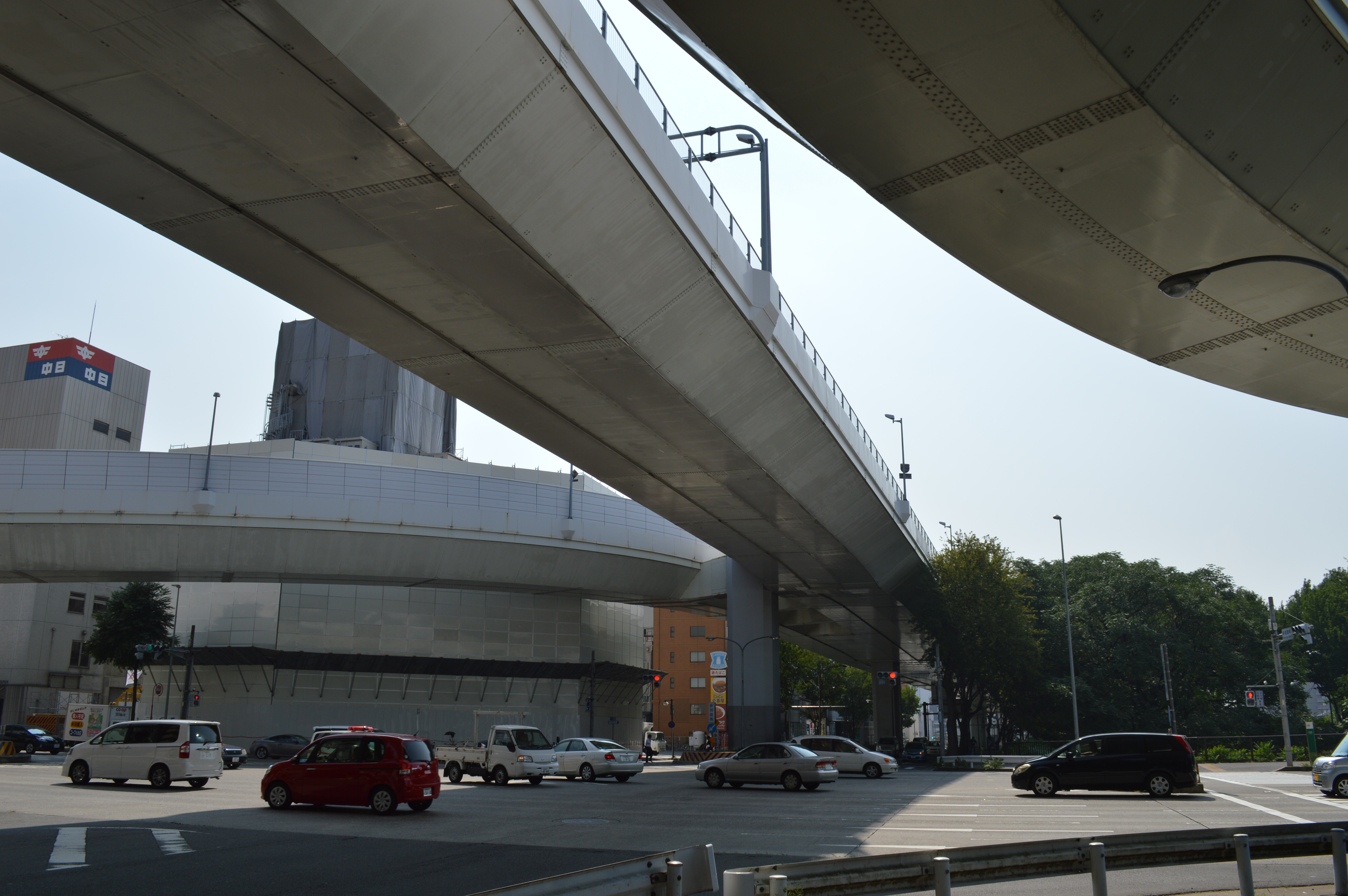 愛知県名古屋市中区の外堀通（手前から奥）と伏見通（左から右）との交差点（新御園橋交差点）、高架は名古屋高速都心環状線